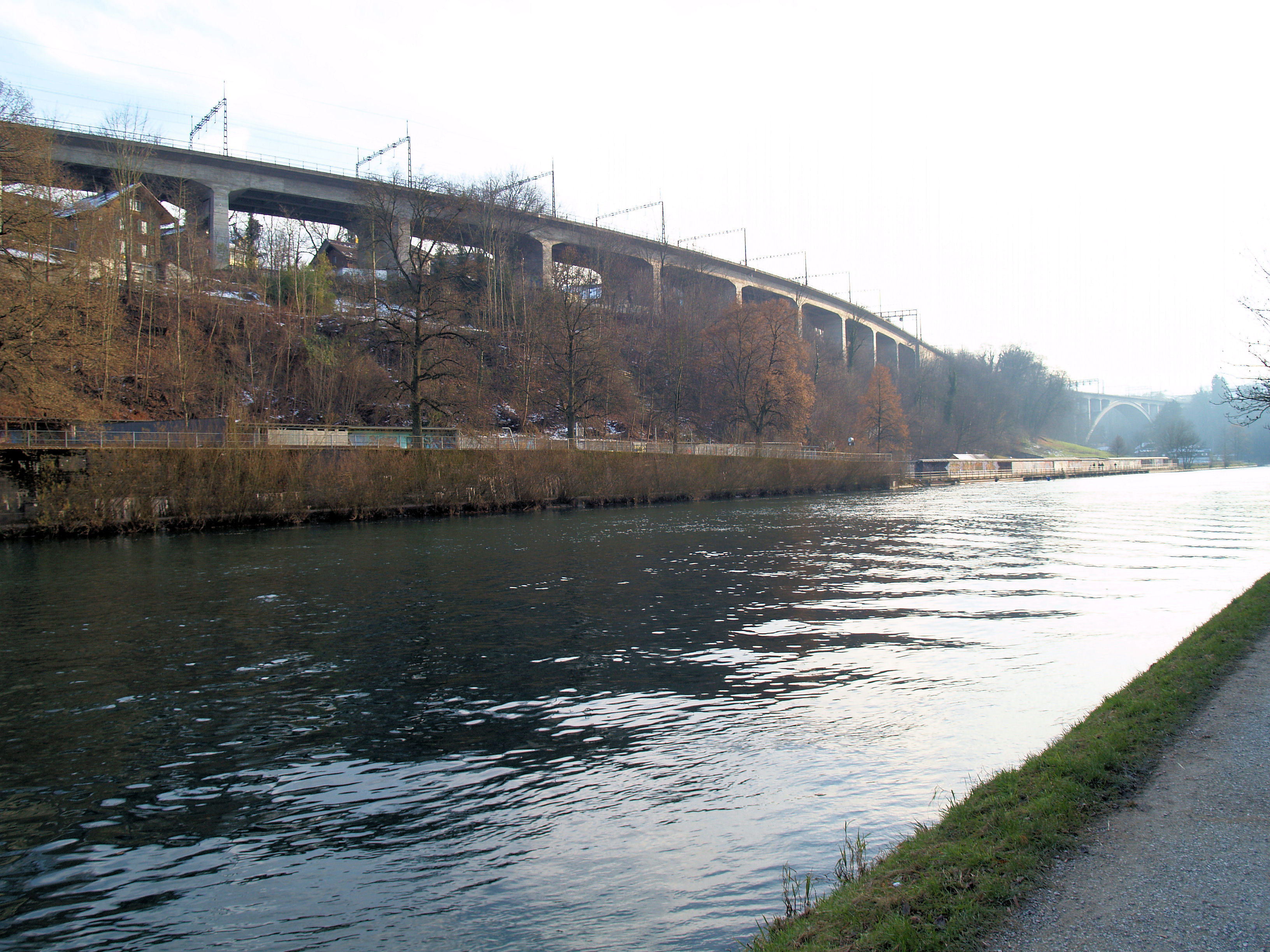 Das Viadukt-Talwegmulde, ein Teil Lorraineviadukt, im Hintergrund ist die Aarebrücke des gleichen Bauwerkes sichtbar. Es handelt sich um die Vierspurige Ostzufahrt zum Bahnhof Bern.